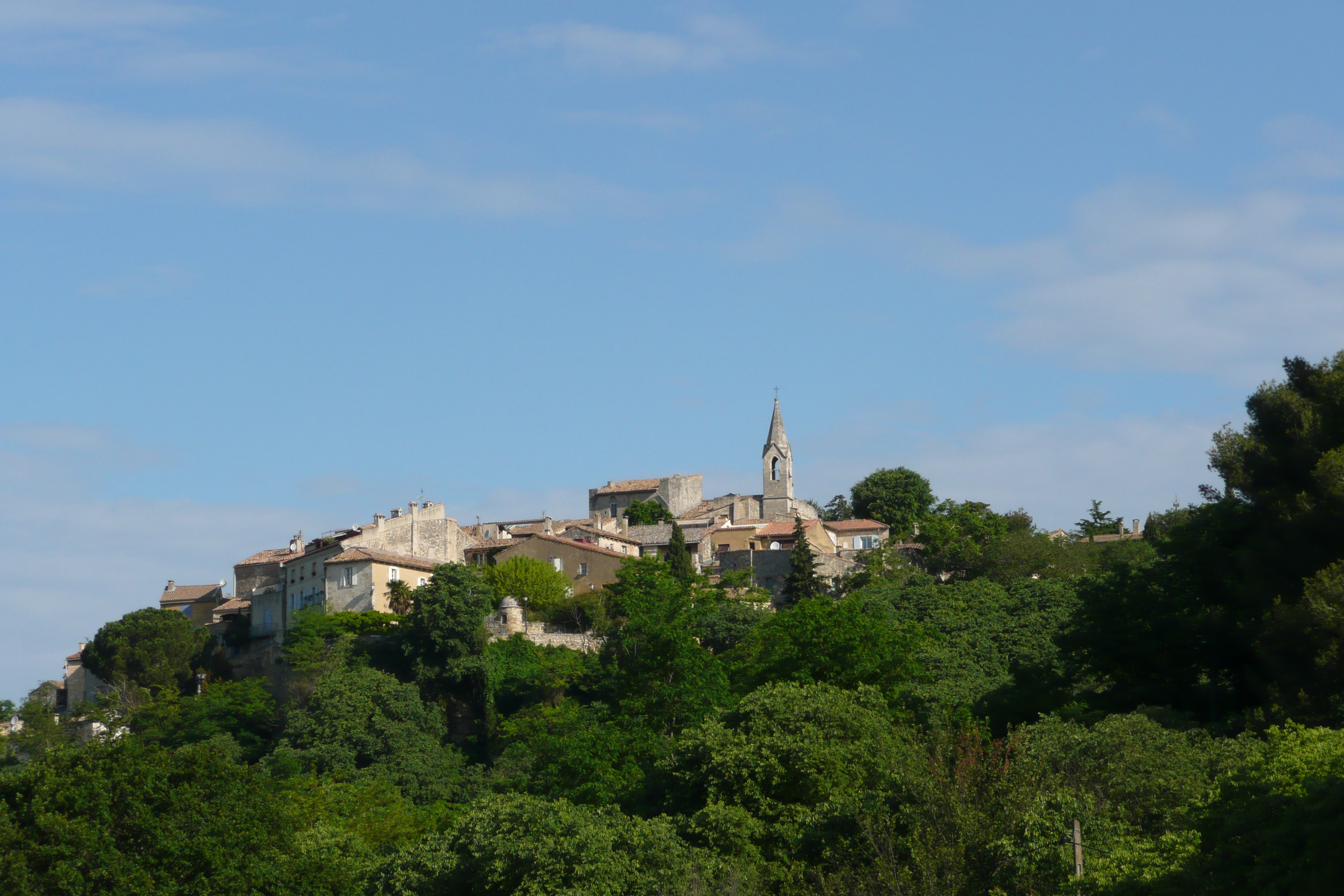 Vue d'ensemble du vieux village Les Angles (Gard).